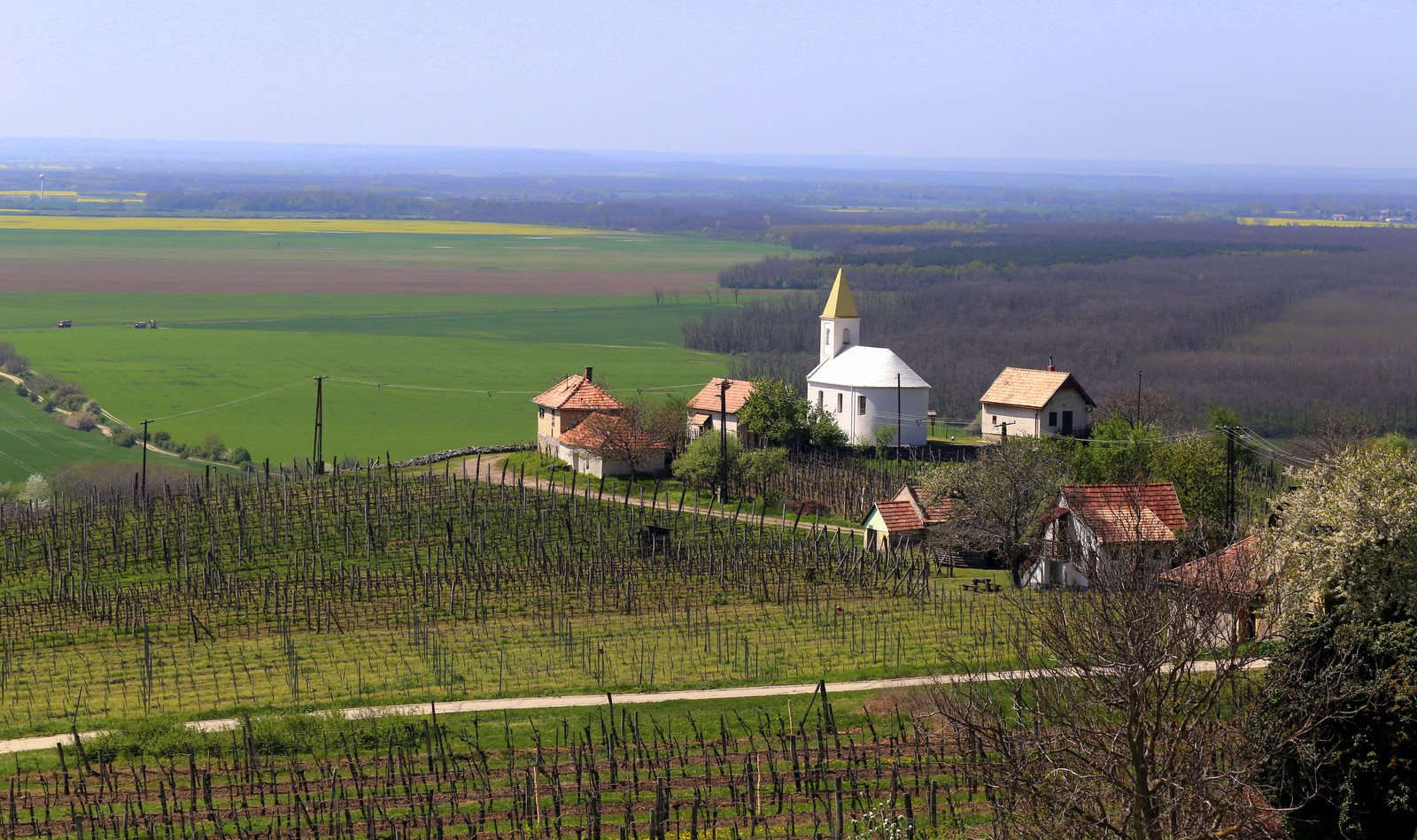 Somlójenő, Szent Ilona kápolna